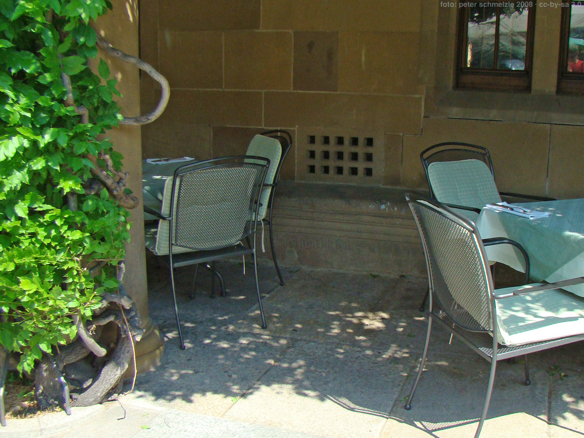 Blick in die Arkaden unter der Treppe des Rathauses in Heilbronn, im Hintergrund ist teilweise die 6,5 Meter lange Steinbank zu erkennen, die zu den ältesten erhaltenen Bestandteilen des Gebäudes zählt.